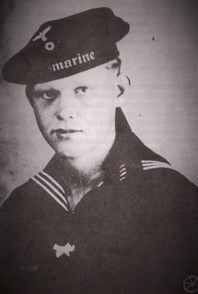 Heinrich Glasmacher født den 21. februar 1924, Matros på minestrygeren M 112, henrettet i Sønderborg den 05-05 1945 af Kriegsmarine.